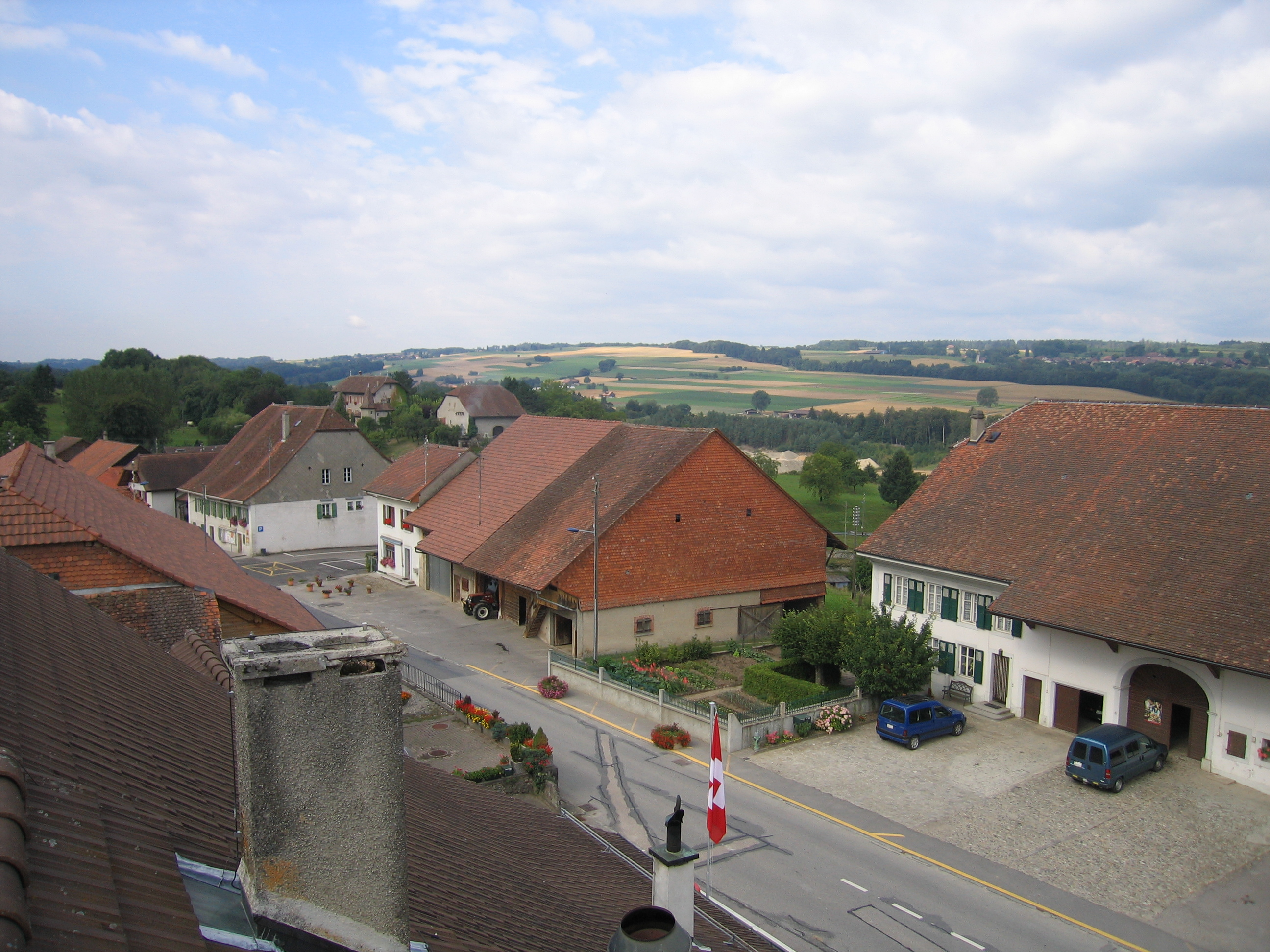 Une vue aérienne du centre du village, photo prose depuis le toit de l'auberge communale